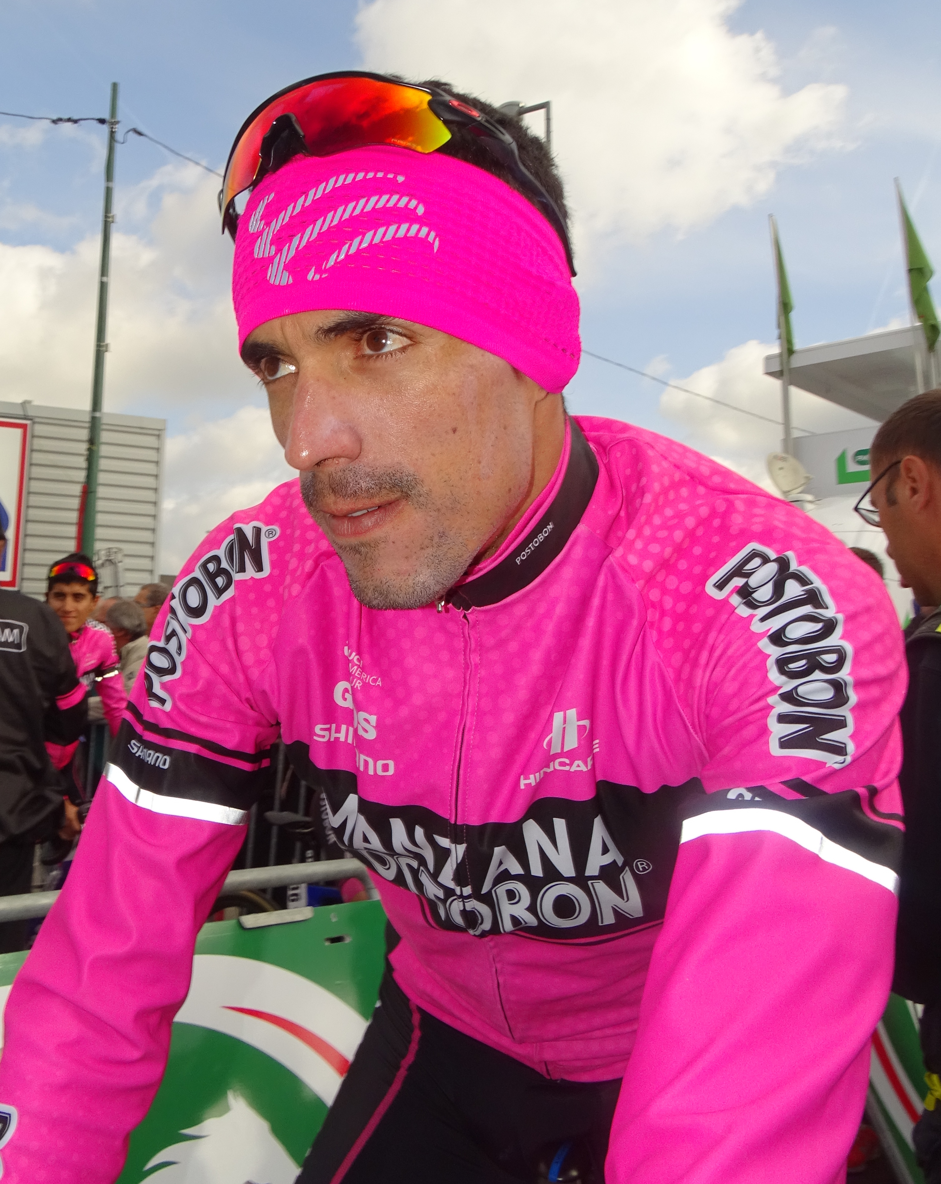 Reportage réalisé le jeudi 13 avril à l'occasion du départ et de l'arrivée du Grand Prix de Denain 2017 à Denain, Nord, Nord-Pas-de-Calais-Picardie, France.